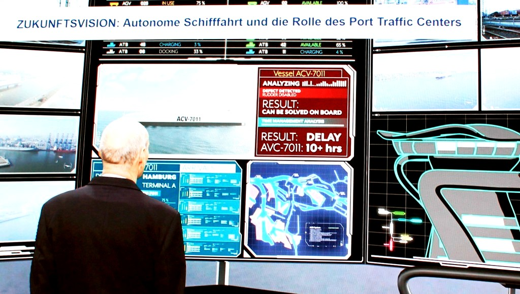 Zukunftsvision des Hamburger Hafens